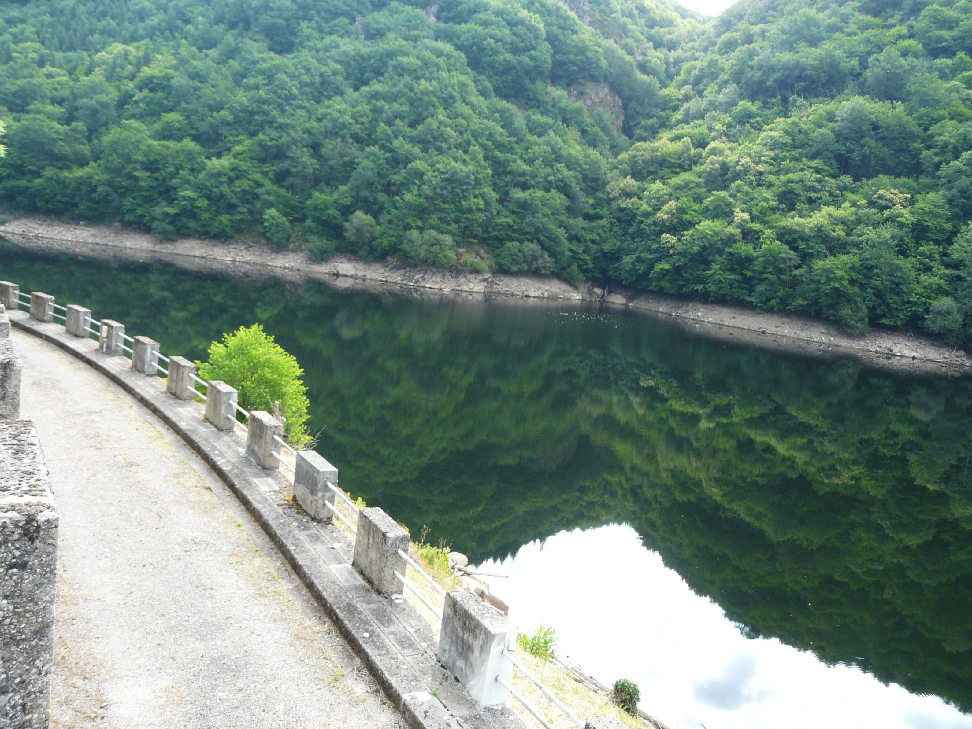 La Maronne dans la retenue du barrage de Hautefage, entre les communes de Hautefage (au premier plan) et Sexcles (sur l'autre rive), Corrèze, France.